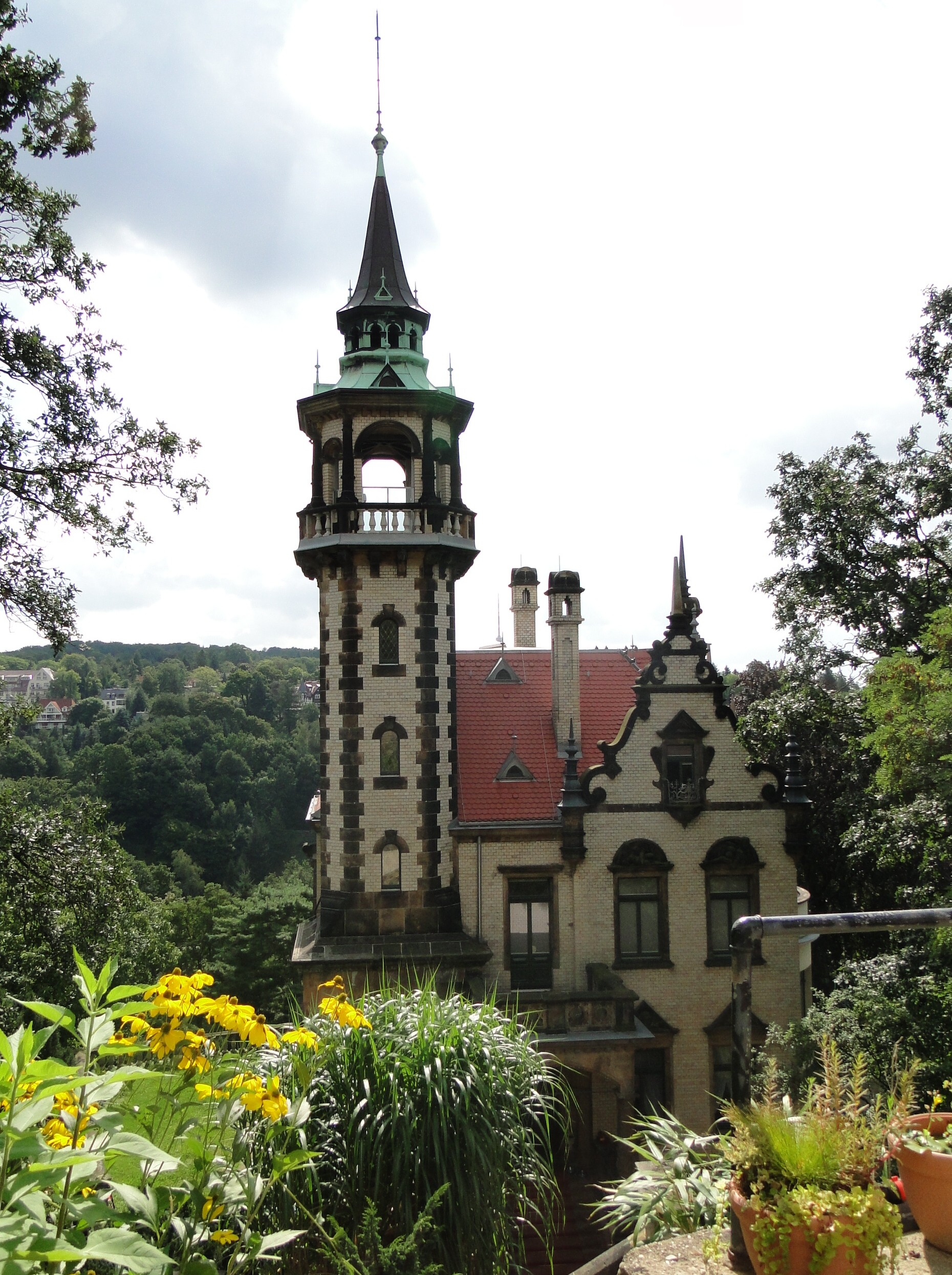 Die Villa San Remo auf dem Weißen Hirsch in Dresden.